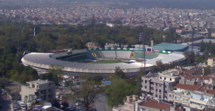 Bursa Atatürk Stadı ve şehrin batı yakası